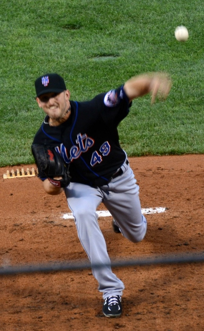 Jon Niese